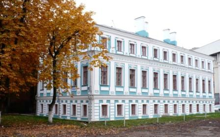 Первое трехэтажное здание Воронежа (1760-1770гг)